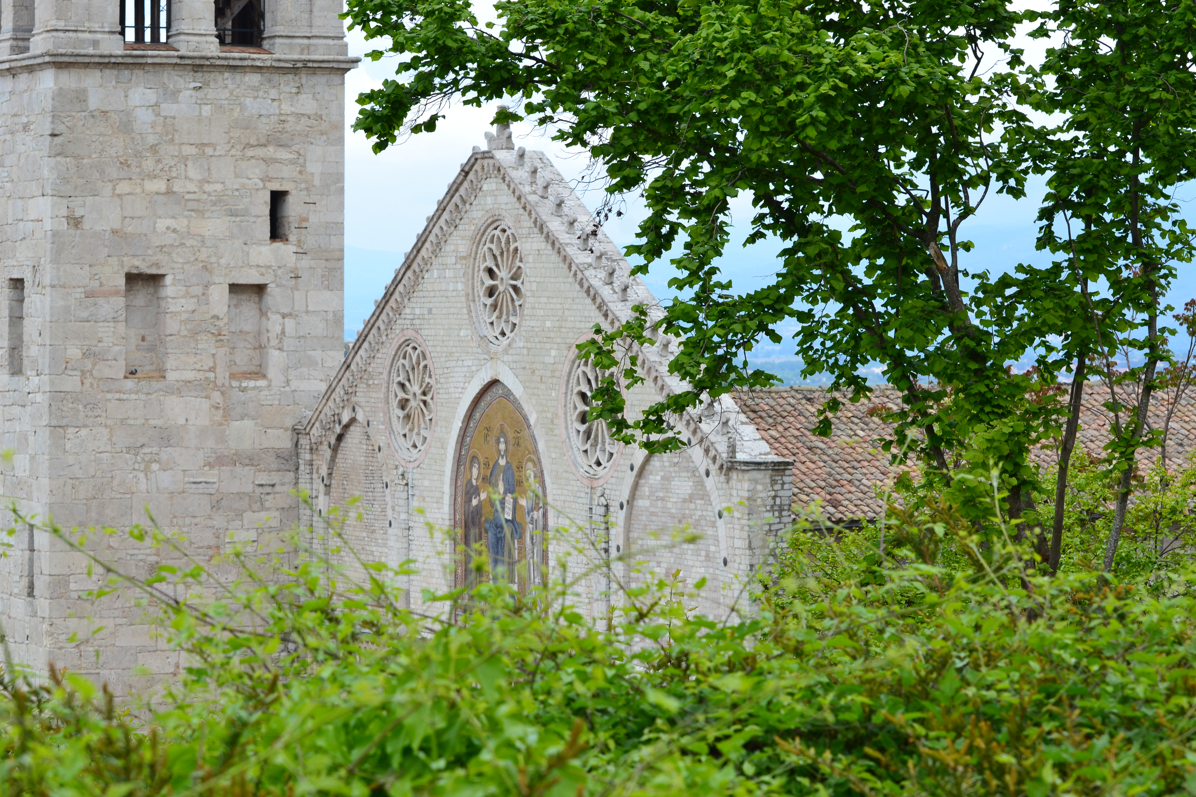 Facciata del Duomo di Spoleto vista dal castello.